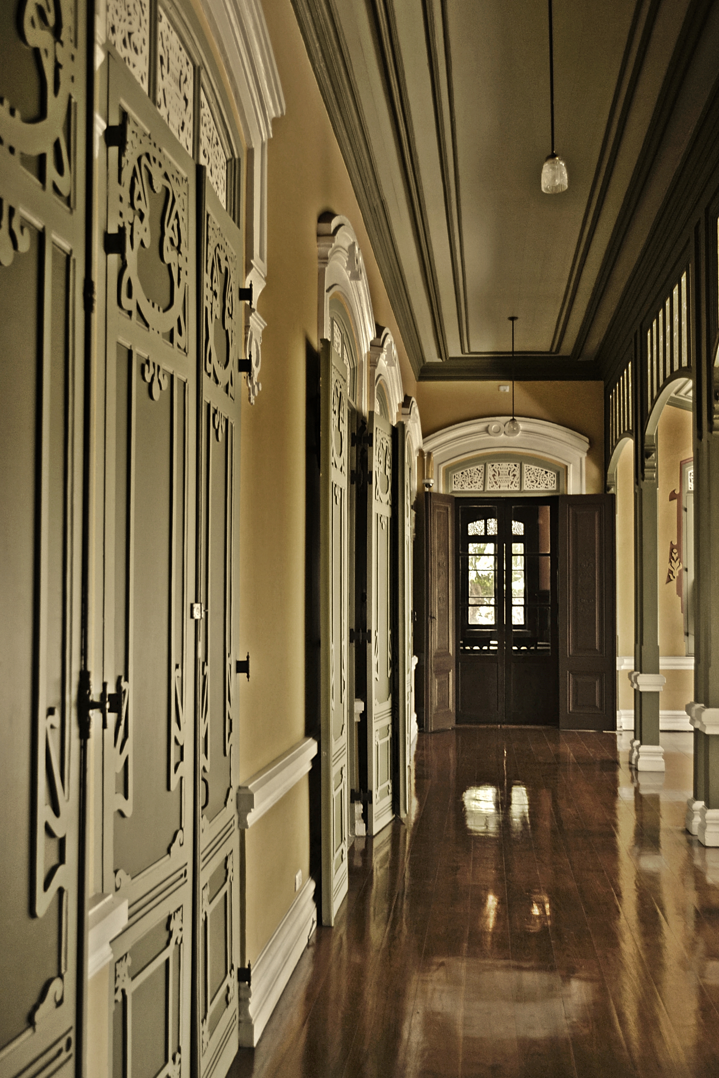 ระเบียงภายในตำหนักจิตรลดา